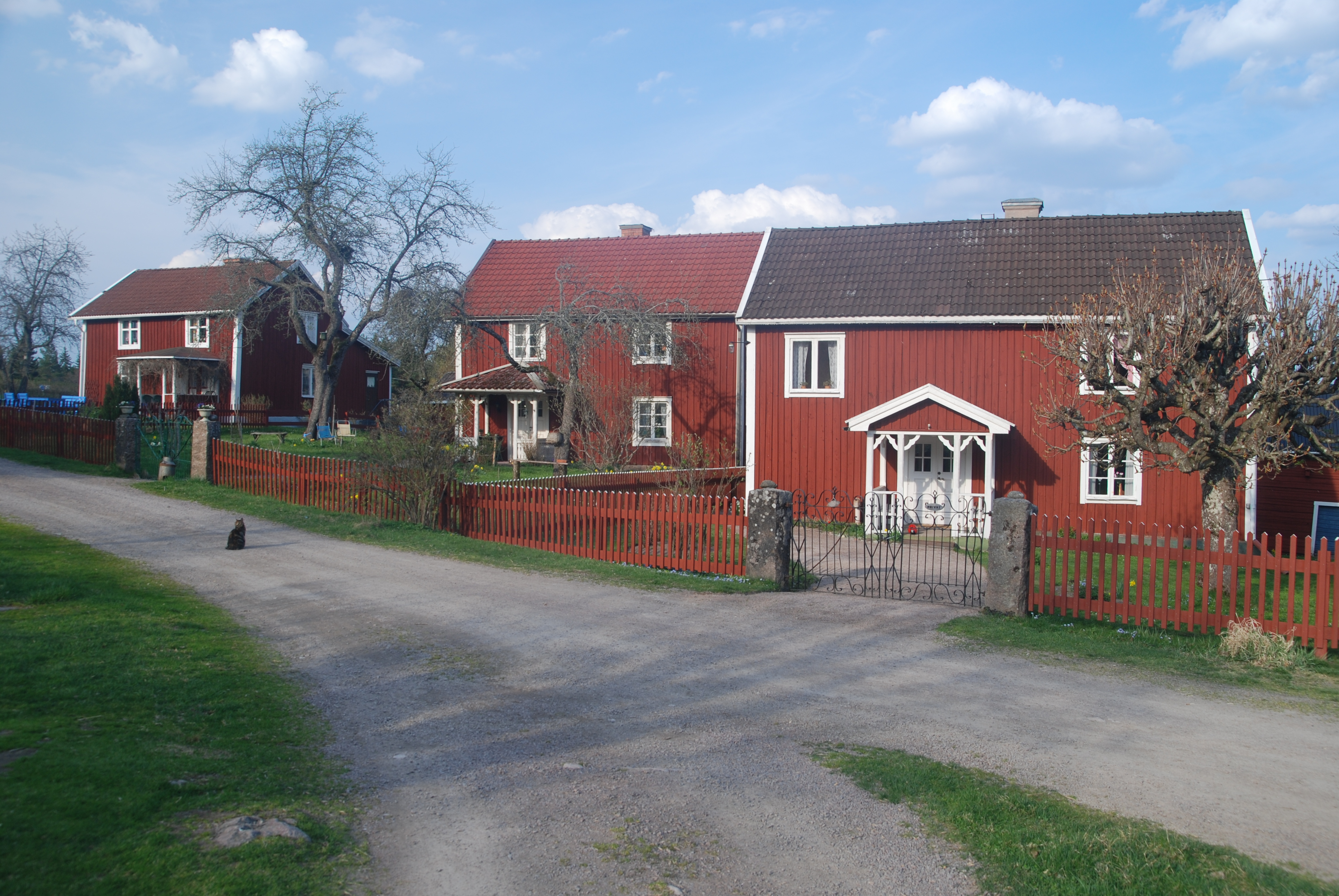 Sevedstorp in Vimmerby, Sweden